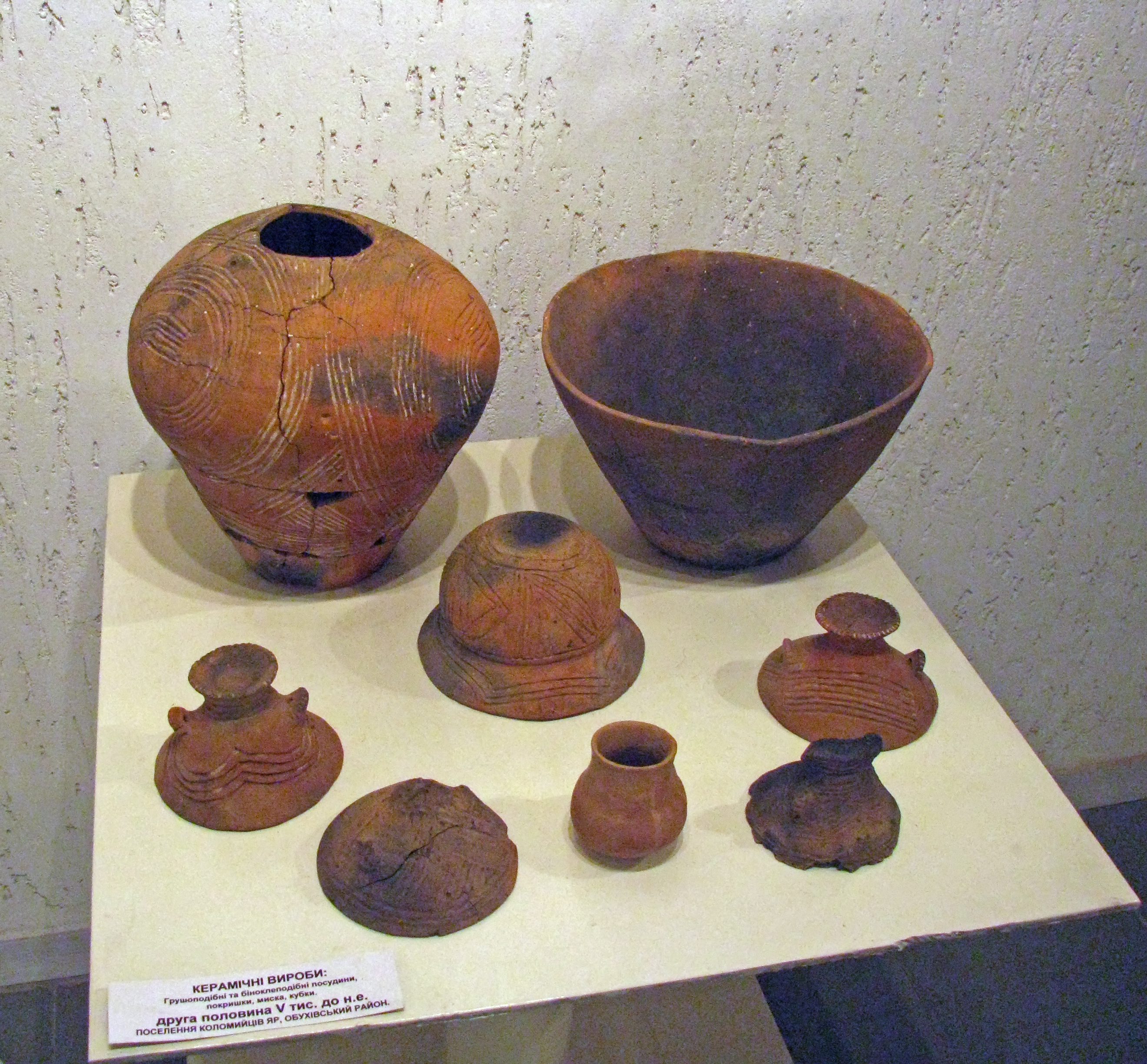 Київський обласний археологічний музей-зали музею